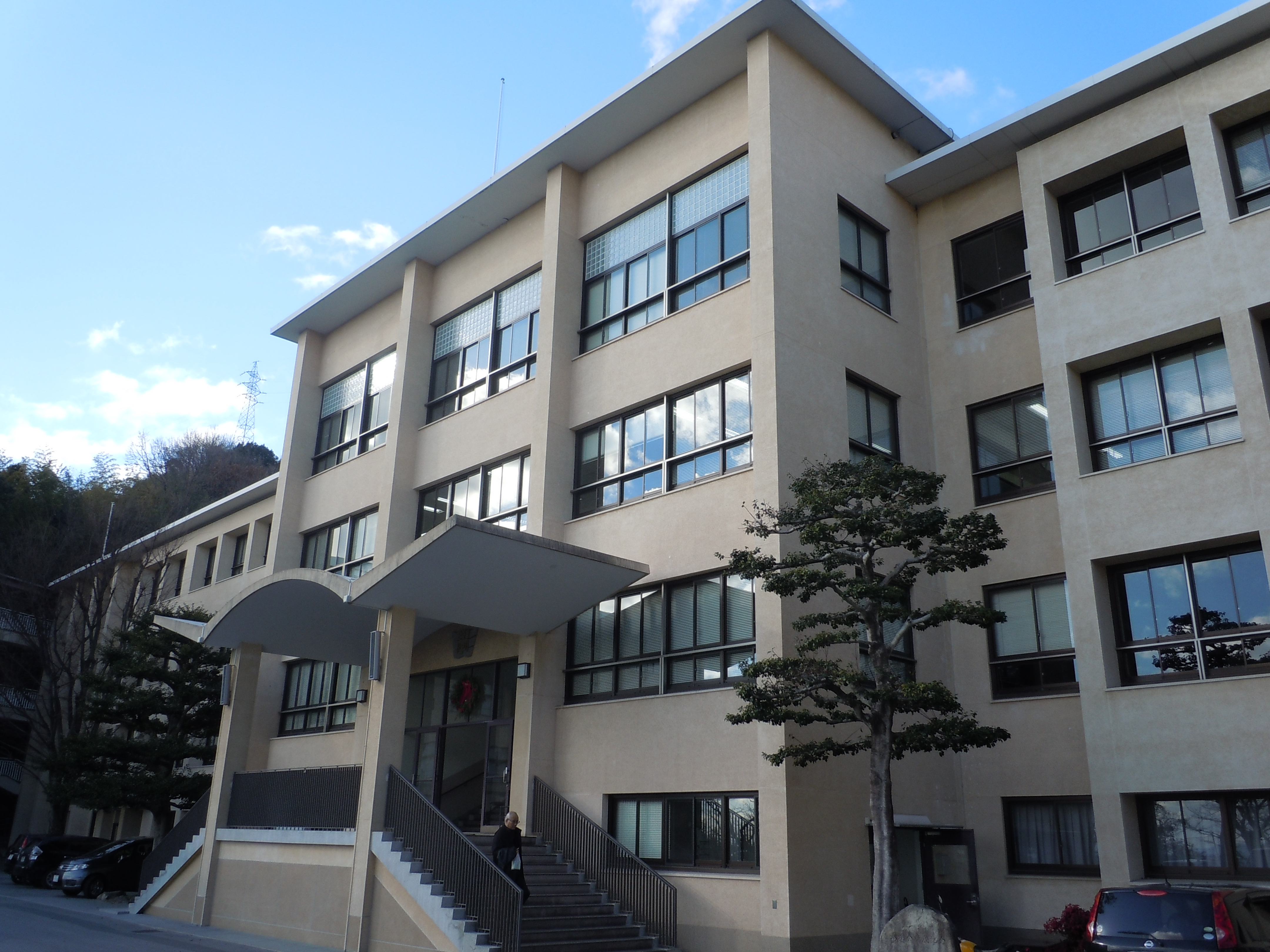 広島学院本校舎。クリスマスリースで装飾された正面玄関と関根理事長が写っている。